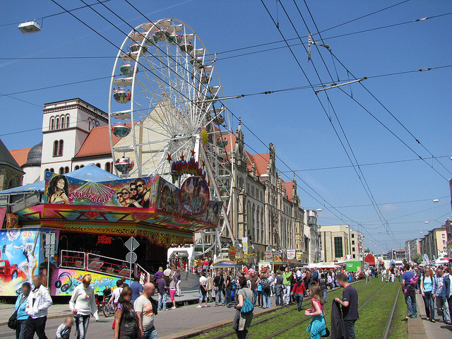 Stadtfest Magdeburg